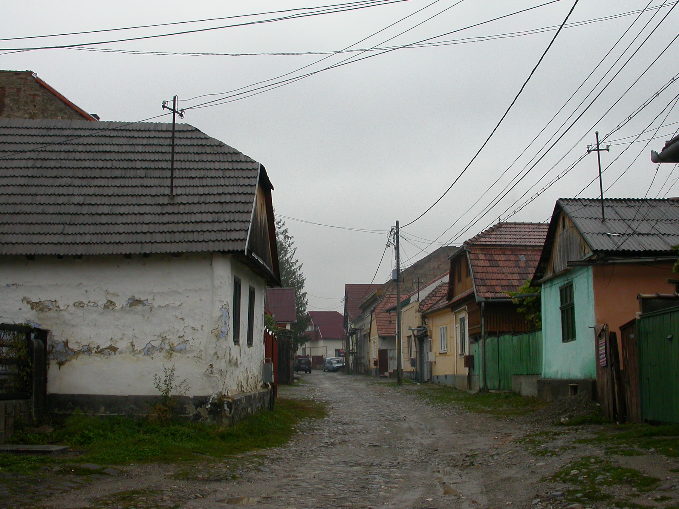 Ansamblul urban "Str. Tompa László" sec. XIX